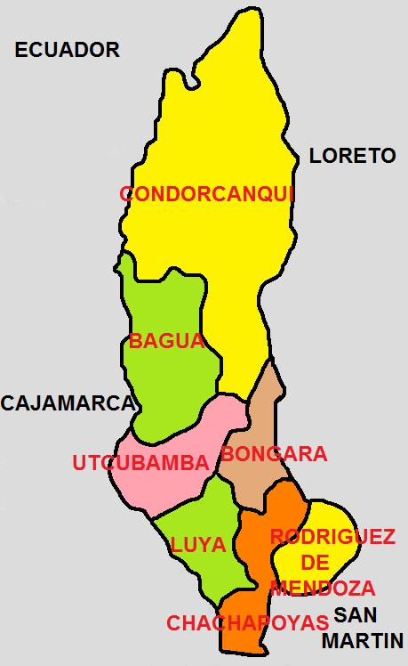 Imagen que muestra la División Politica del Departamento de Amazonas, una de las 25 circunscripciones en que se divide el Perú